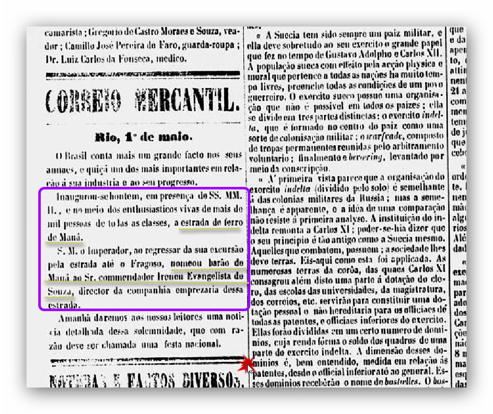 Correio mercantil (Brasil) 1 de Mayo 1854 anuciando que : " en el dia de ayer se inauguro el ferrocarril de Maua y que al volver de la excursion su majestad Pedro II nombro Baron de Maua a Ireneo Evangelista de Souza